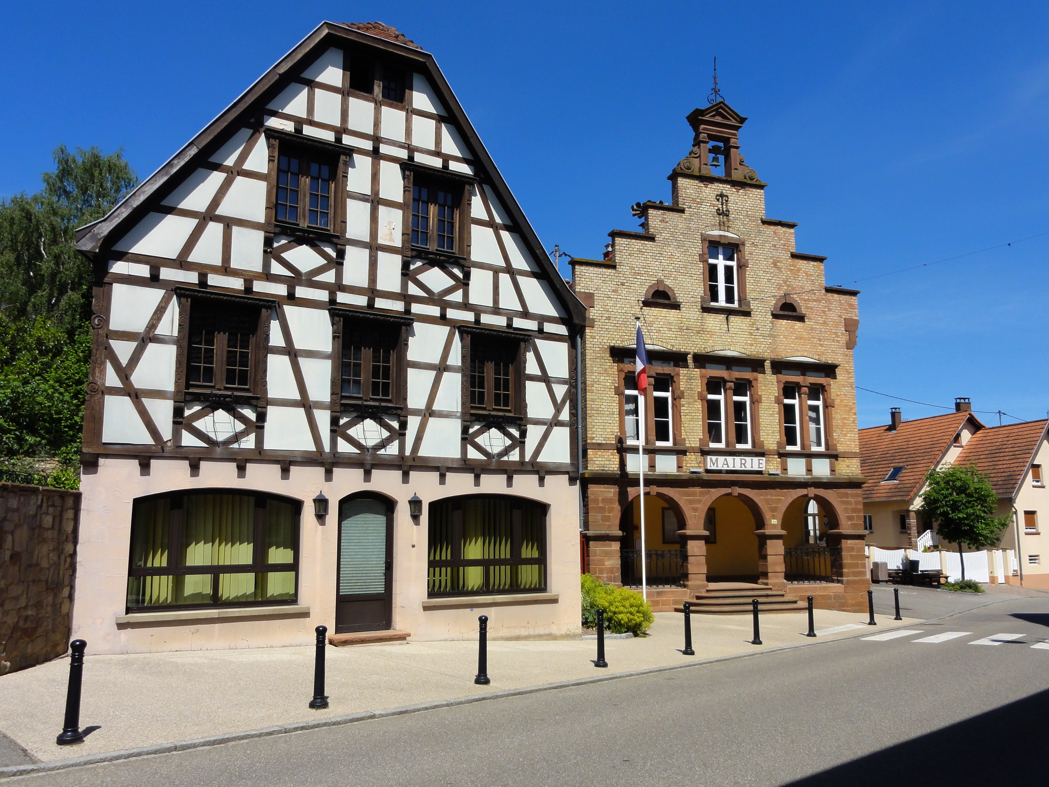 Alsace, Bas-Rhin, Mietesheim, Mairie (1893), 32 rue Principale. .